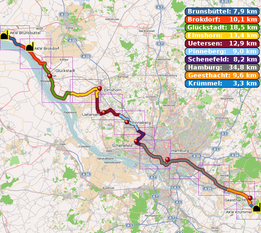 Streckenverlauf der KETTENreAKTION This map may be incomplete, and may contain errors. Don't rely solely on it for navigation.